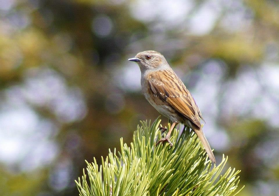 pokrzywnica (Prunella modularis)